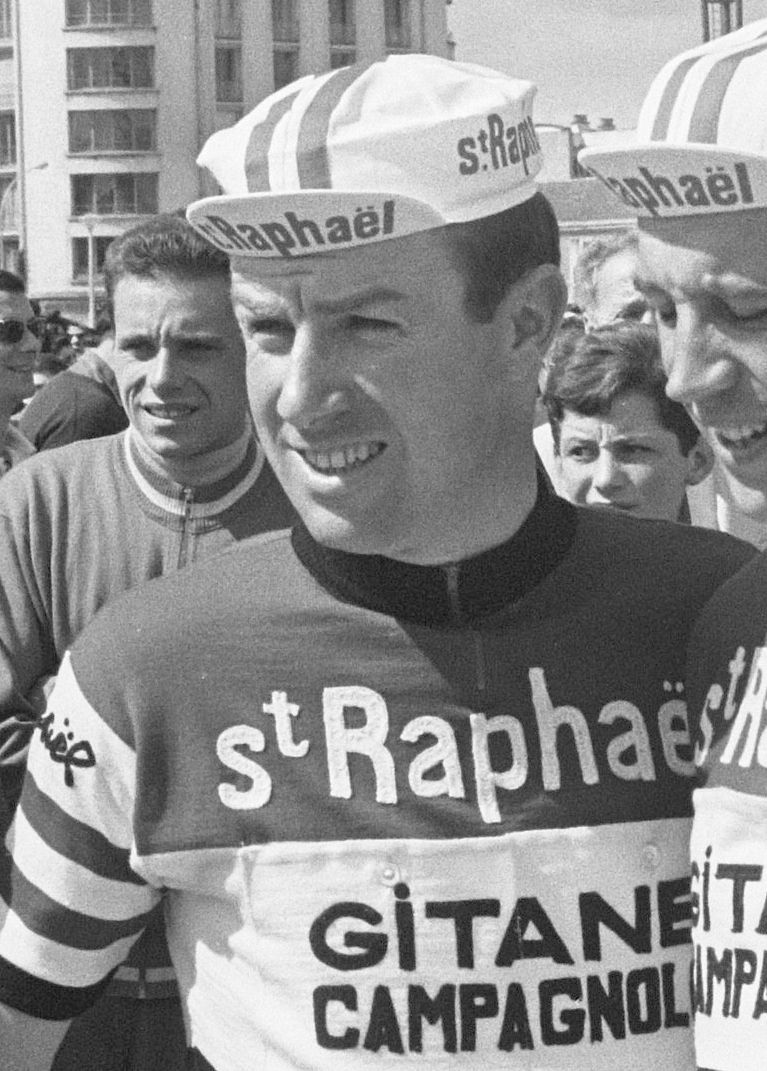 Nationaal Archief Beschrijving: De St. Raphael-Gitanes ploeg. vlnr: Seamus Elliott Datum: 24 juni 1964 Bestanddeelnummer 916-5778 Vervaardiger: Anefo / Harry Pot (1929–1996) DescriptionDutch photographer and cinematographerDate of birth/death 1929 1996Work location Amsterdam, BentveldAuthority control : Q27877051 VIAF: 284191334 ISNI: 0000 0003 9050 874X Koninklijke: 073478326 creator QS:P170,Q27877051 URL: Voor meer informatie over het Nationaal Archief: Voor meer foto's uit deze en andere collecties, bezoek onze Beeldbank:, U kunt ons helpen onze kennis van de fotocollecties te verrijken door tags en commentaren toe te voegen. Herkent u mensen of locaties of heeft u een bijzonder verhaal te vertellen bij één van de foto's, laat dan een reactie achter (als u ingelogd bent bij Flickr) of stuur een mailtje naar